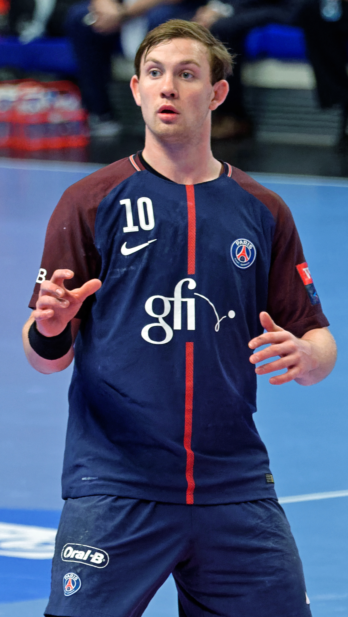 Match entre le PSG Handball et Aalborg. A Coubertin, le 02 décembre 2017.